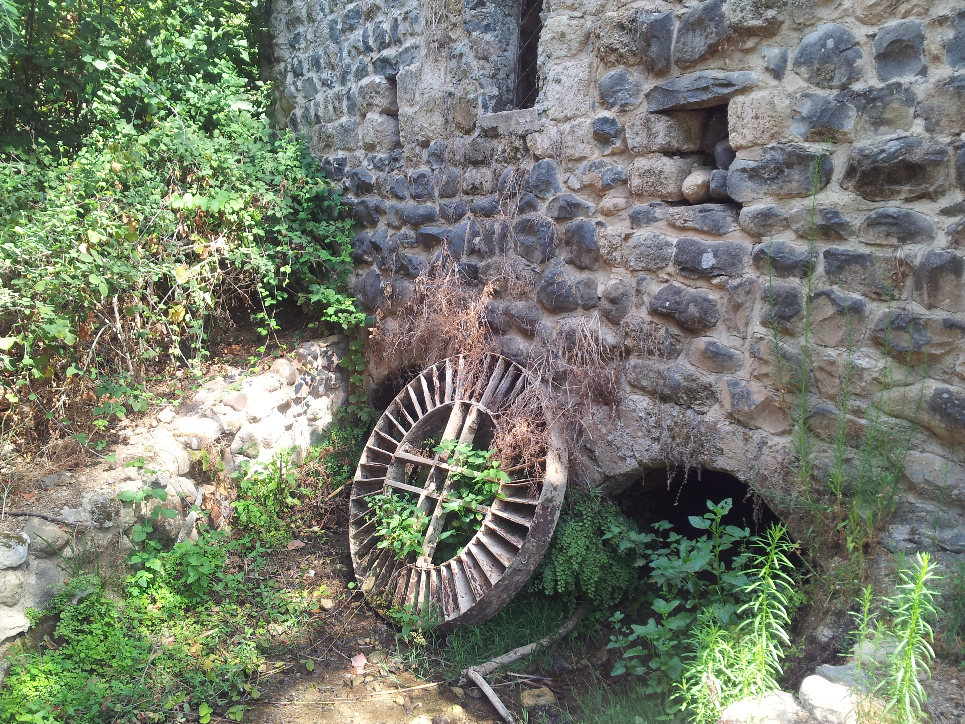 teldan water mill